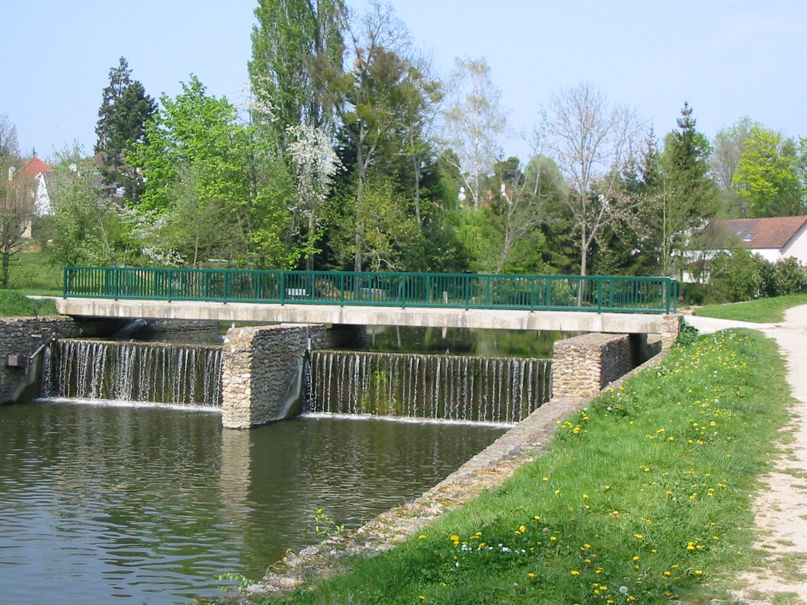 Le barrage des vannes rouges sur l'Yerres à Brunoy (Essonne)